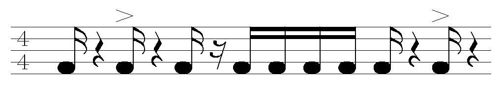 Slow funaná rhythm model